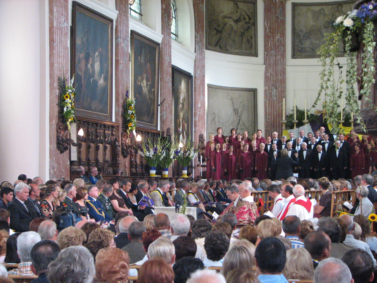 Pendant les Vepres Gouyasse, ducasse d'Ath 2007